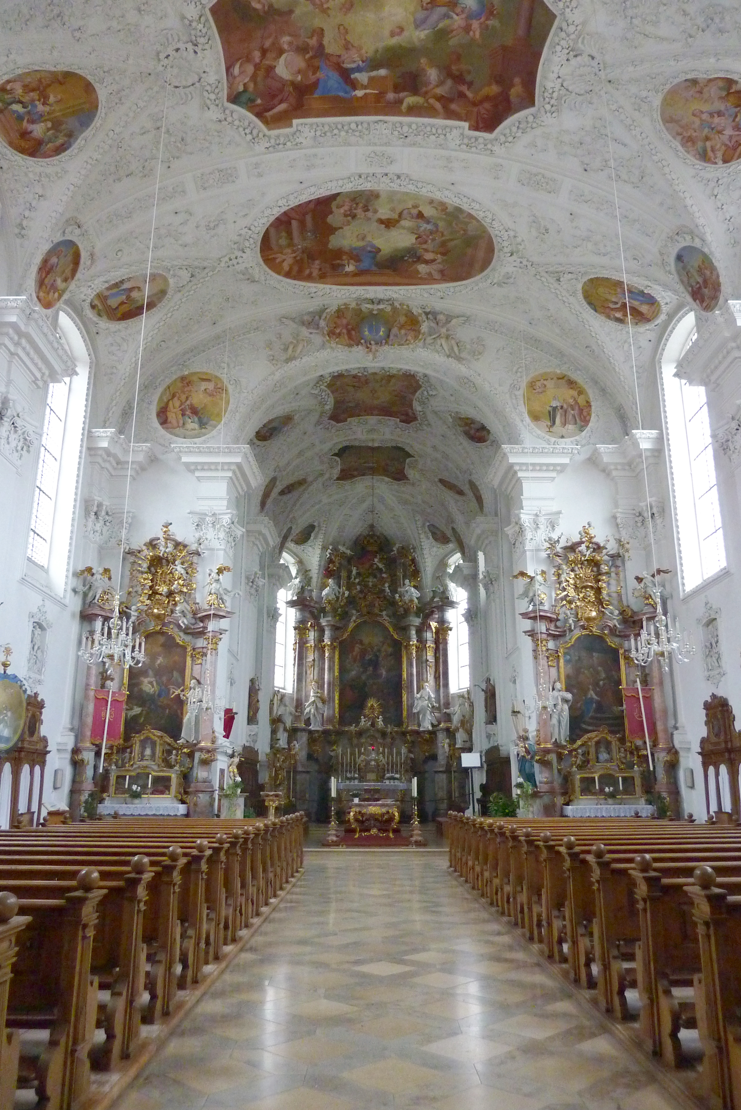 Ehemalige Damenstiftskirche, katholische Pfarrkirche St. Johannes Baptist und Johannes Evangelist in Edelstetten in der Gemeinde Neuburg an der Kammel im Landkreis Günzburg (Bayern), Innenraum